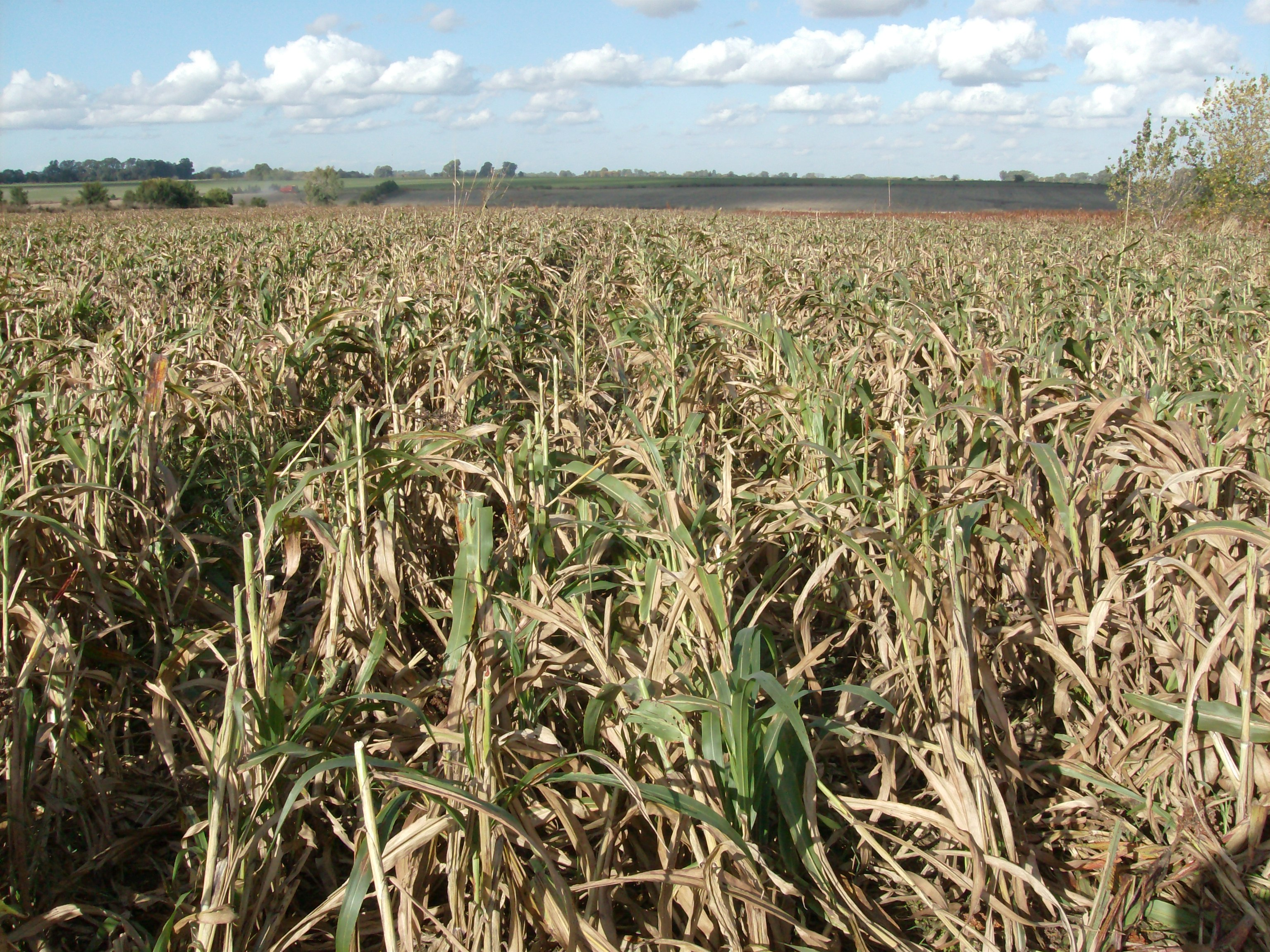 Rastrojo de un cultivo de Sorgo Granífero (cosechado) en Zárate, Argentina. En la imagen se puede ver un cultivo de sorgo que fue cosechado y solo queda en el suelo el rastrojo. La cantidad de rastrojo es muy importante y pareciera un cultivo que aún no fue cosechado. – La foto fue tomada el 15 de Mayo de 2011 día en que el cultivo fue cosechado. Fue sembrado con una densidad de 250 mil plantas/ha a 52 cm entre cada surco.